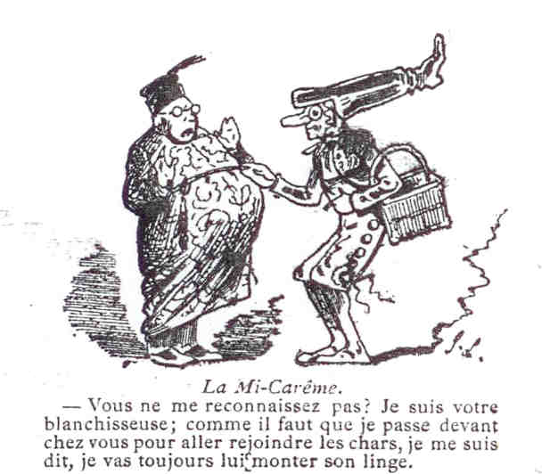 Dessin humoristique illustrant la Mi-Carême au Carnaval de Paris.